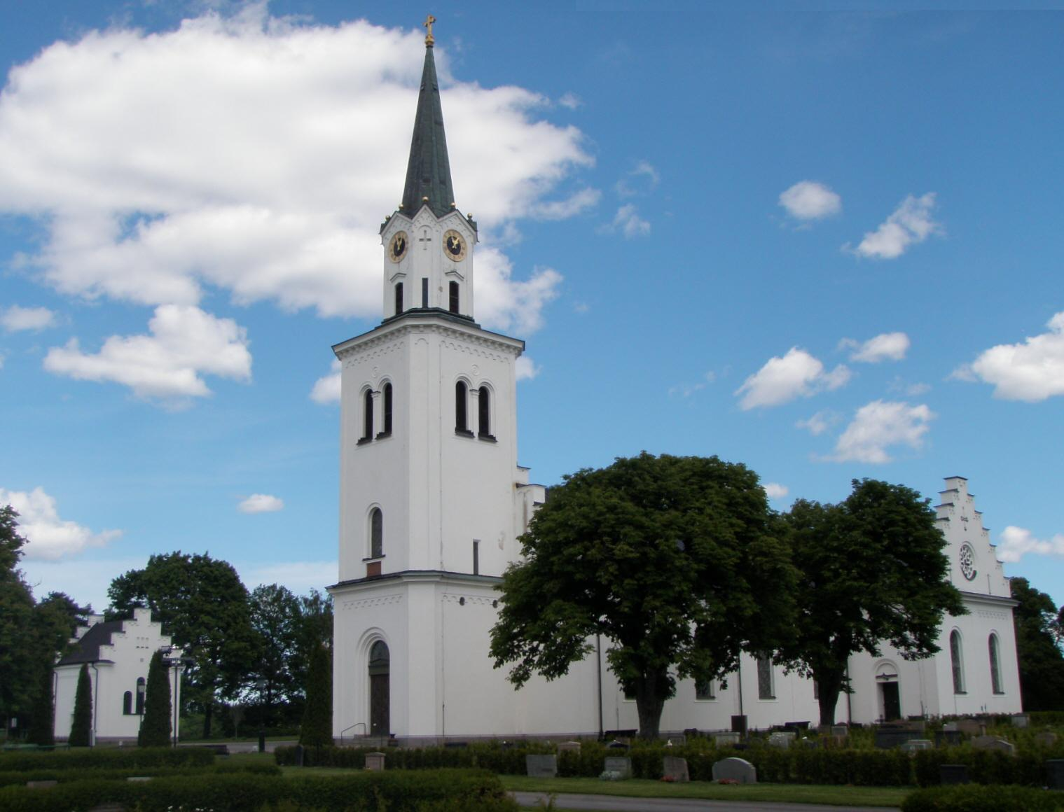 Risinge nya kyrka, som stod färdig 1849, är en kyrkobyggnad i Risinge socken och församling, Finspånga läns härad, Östergötland. Den ligger 4 km öster om Finspång och tillhör Linköpings stift.